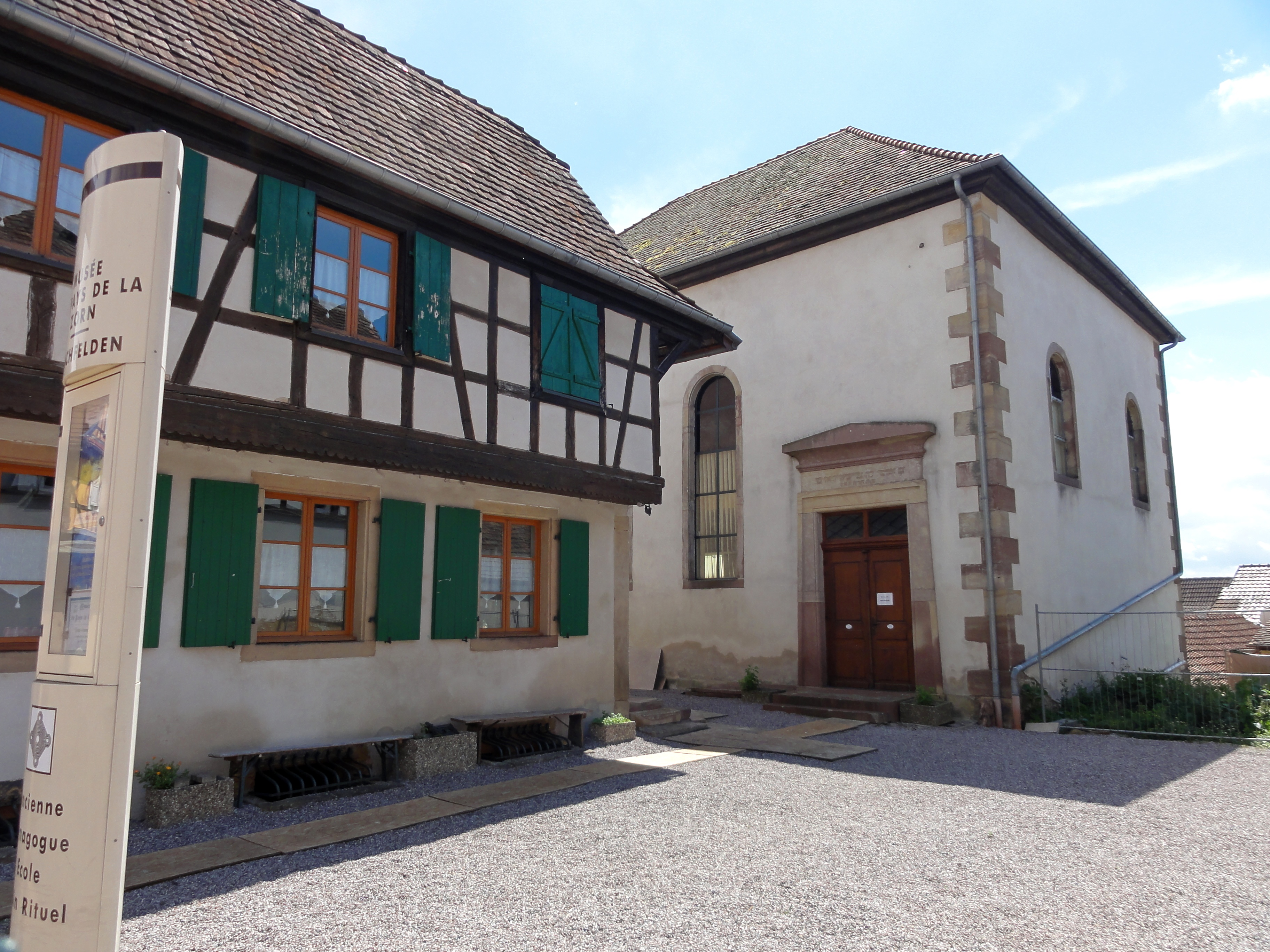 Alsace, Bas-Rhin, Hochfelden, Bâtiment abritant un bain rituel (miqvé), une salle de réunion et une salle d'école (heder), ainsi qu'un logement pour l'instituteur et chantre; actuellement Musée du Pays de la Zorn. It is indexed in the Base Mérimée, a database of architectural heritage maintained by the French Ministry of Culture, under the references PA67000004 and IA67009236 .